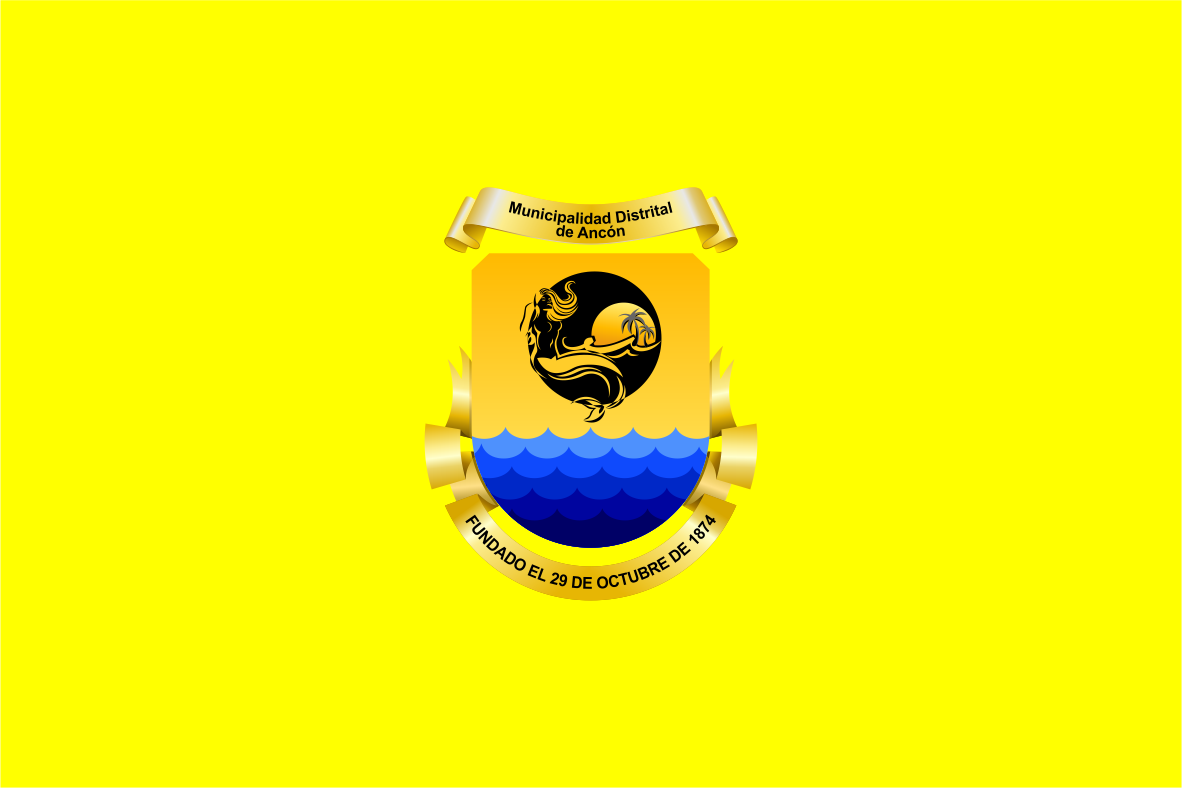 Distrito de Ancón - Provincia de Lima - Región Lima